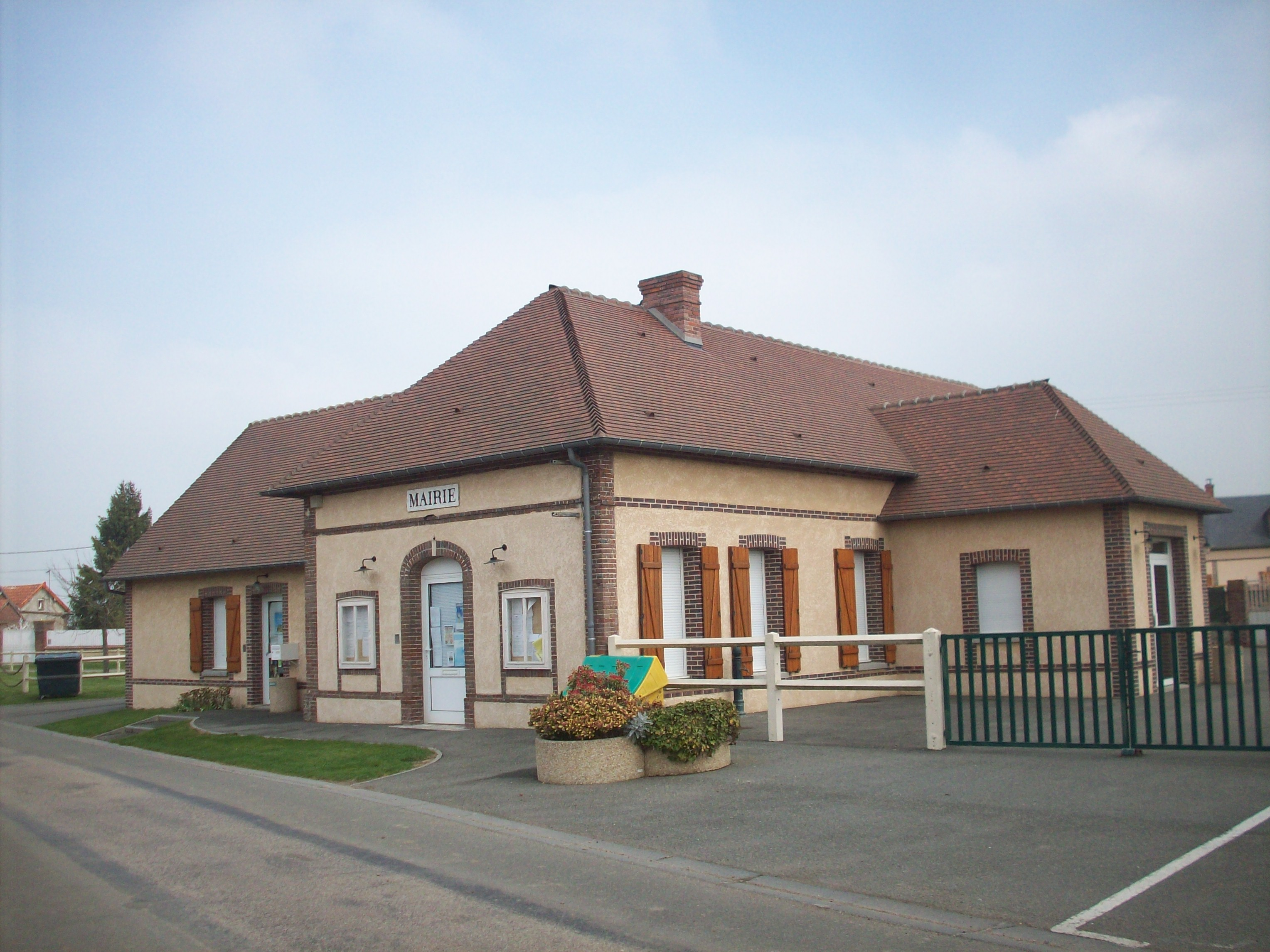 Mairie de Moisville.